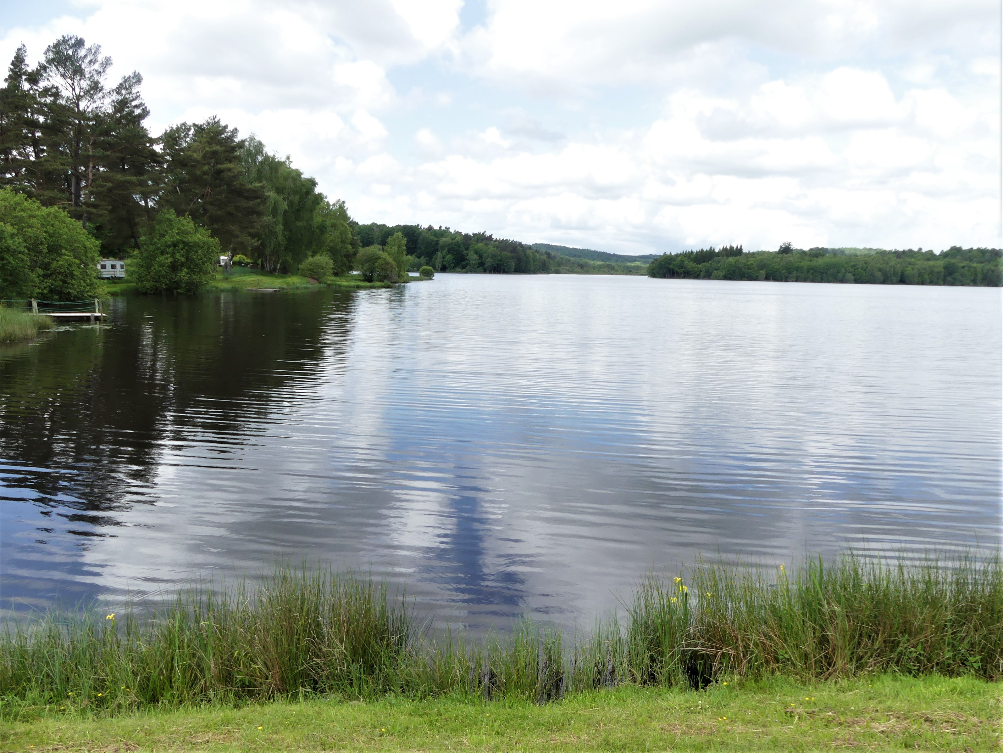 L'étang de Méouze alimenté par la Méouzette, Saint-Oradoux-de-Chirouze, Creuse, France.